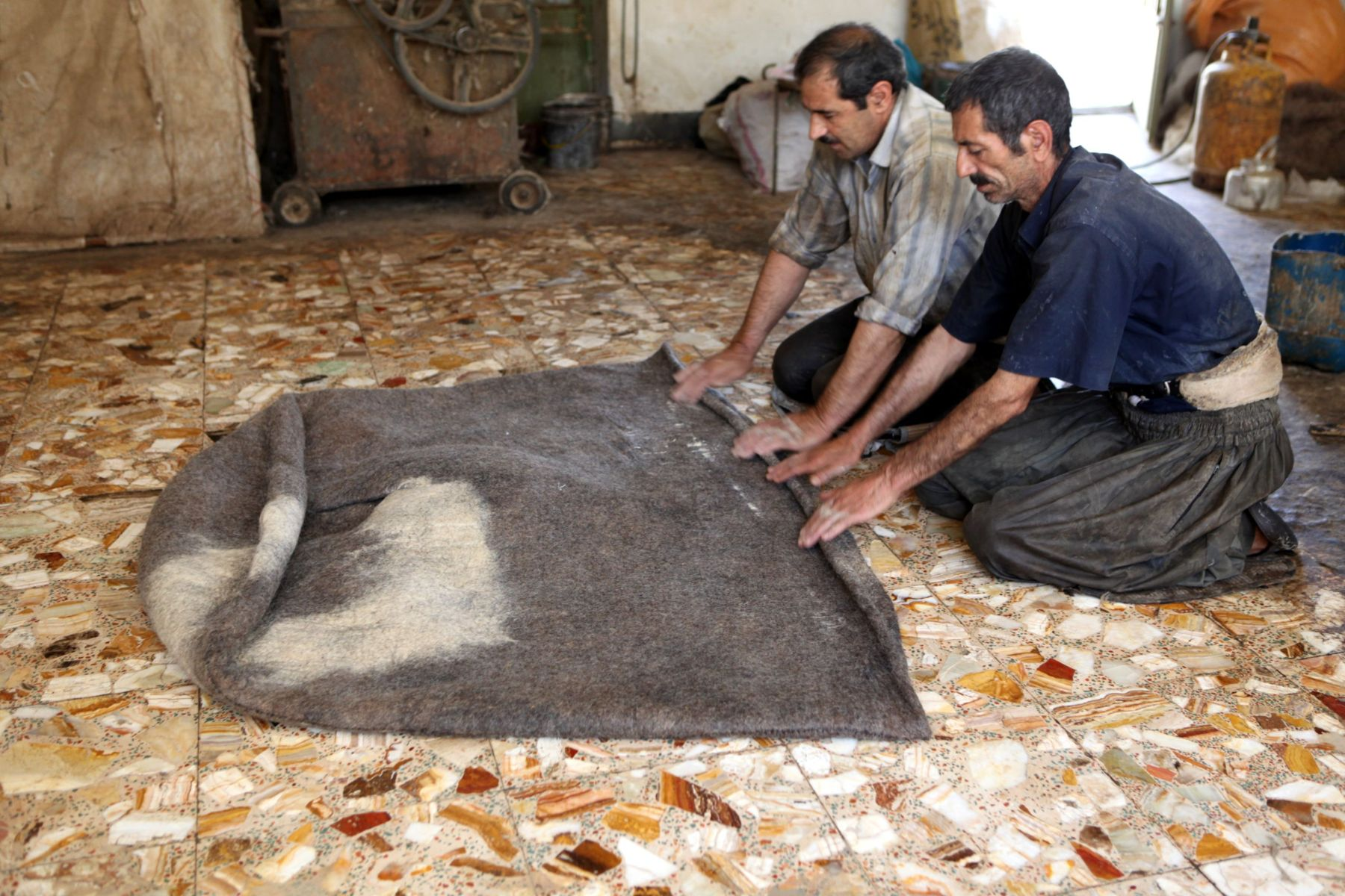 یک کارگاه نمدبافی در شهرکرد.